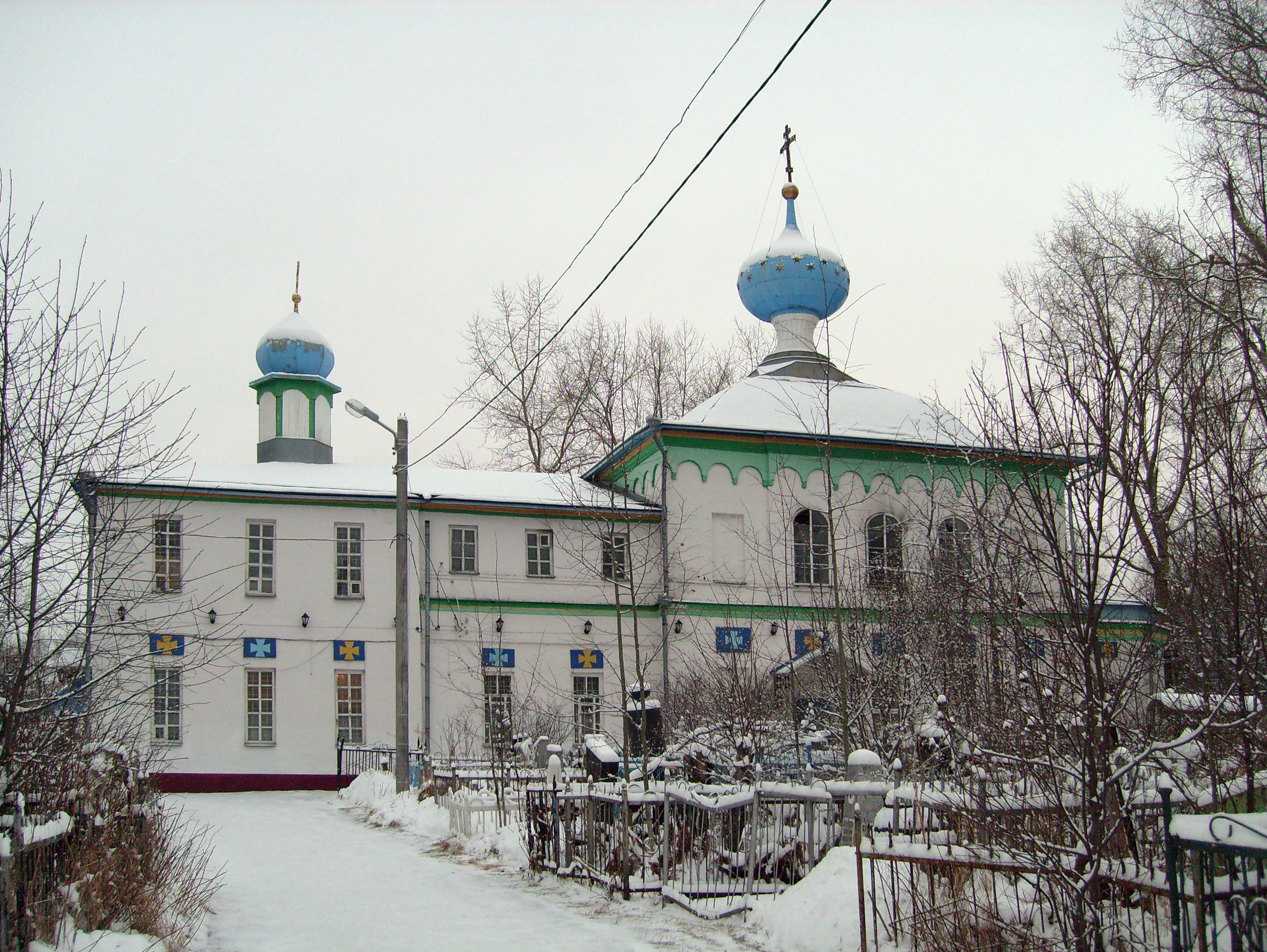 Свято-Илиинский кафедральный собор, ул. Ильинская, г. Архангельск. Кафедра епископа Архангельского и Холмогорского